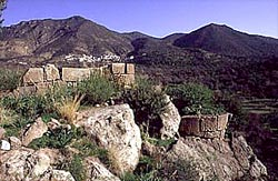 Akropolis des antiken Methanas